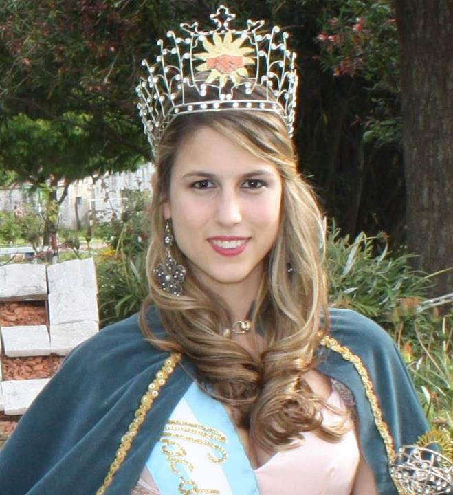 Romina Gianola